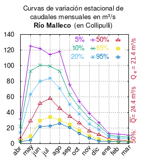 Curvas de variación estacional del río Malleco en Collipulli. # Dirección General de Aguas # Diagnóstico y clasificación de los cursos y cuerpos de agua según objetivos de calidad. Cuenca del río Biobío. # Santiago de Chile # Ministerio de Obras Públicas (Chile) # 2004 # url: # urlarchivo: # Tabla 4.17: Estación Malleco en Collipulli pág. 89 mes 5% 10% 20% 50% 85% 95% abr 31.77 21.72 13.93 6.47 3.19 2.45 may 125.16 92.81 63.32 28.71 9.59 4.71 jun 122.18 100.94 80.09 51.47 29.86 21.68 jul 114.06 99.44 83.58 58.14 33.91 22.59 ago 118.27 93.04 70.89 45.26 30.28 25.83 sep 75.56 62.37 50.11 34.62 24.31 20.84 oct 53.99 46.14 38.13 26.50 16.92 13.00 nov 38.75 32.00 25.37 16.28 9.43 6.84 dic 27.26 22.96 18.38 11.36 5.53 3.34 ene 12.79 10.78 8.76 5.90 3.62 2.72 feb 11.98 9.34 7.03 4.35 2.80 2.34 mar 11.14 8.60 6.40 3.91 2.51 2.11 This plot was created with Gnuplot.